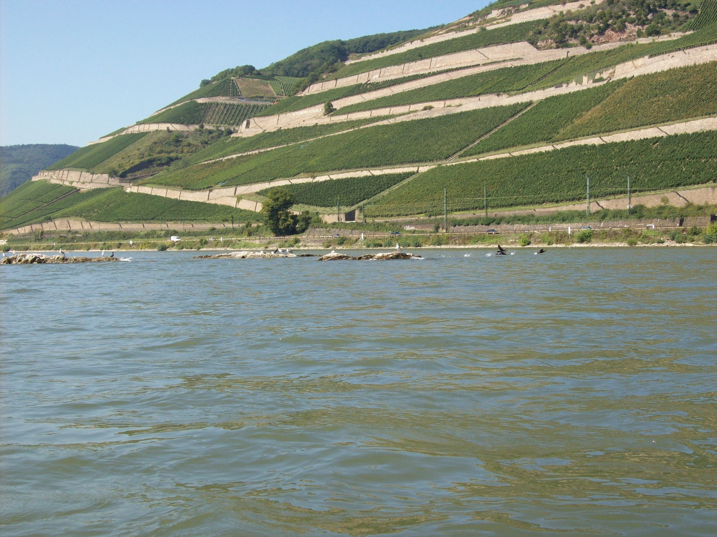 Untiefe bei Rüdesheim am Rhein (Krausaue)